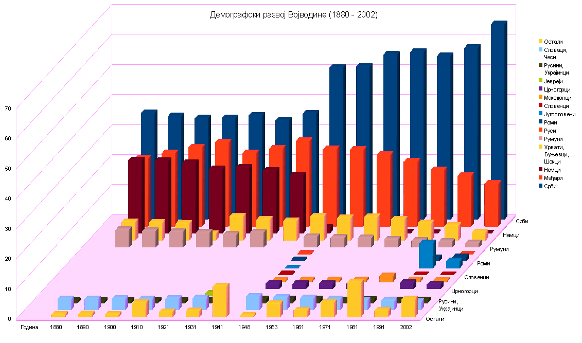 Према подацима чланка Демографија Војводине (стање 28.02.2010.)